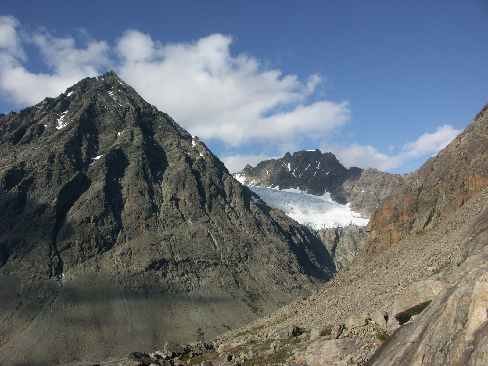 Tvillingsbreen glacier between Tvillingstinden and Tafeltinden − view from Skáidevárri. Lyngsalpane (Lyngen Alps), Troms, Norway